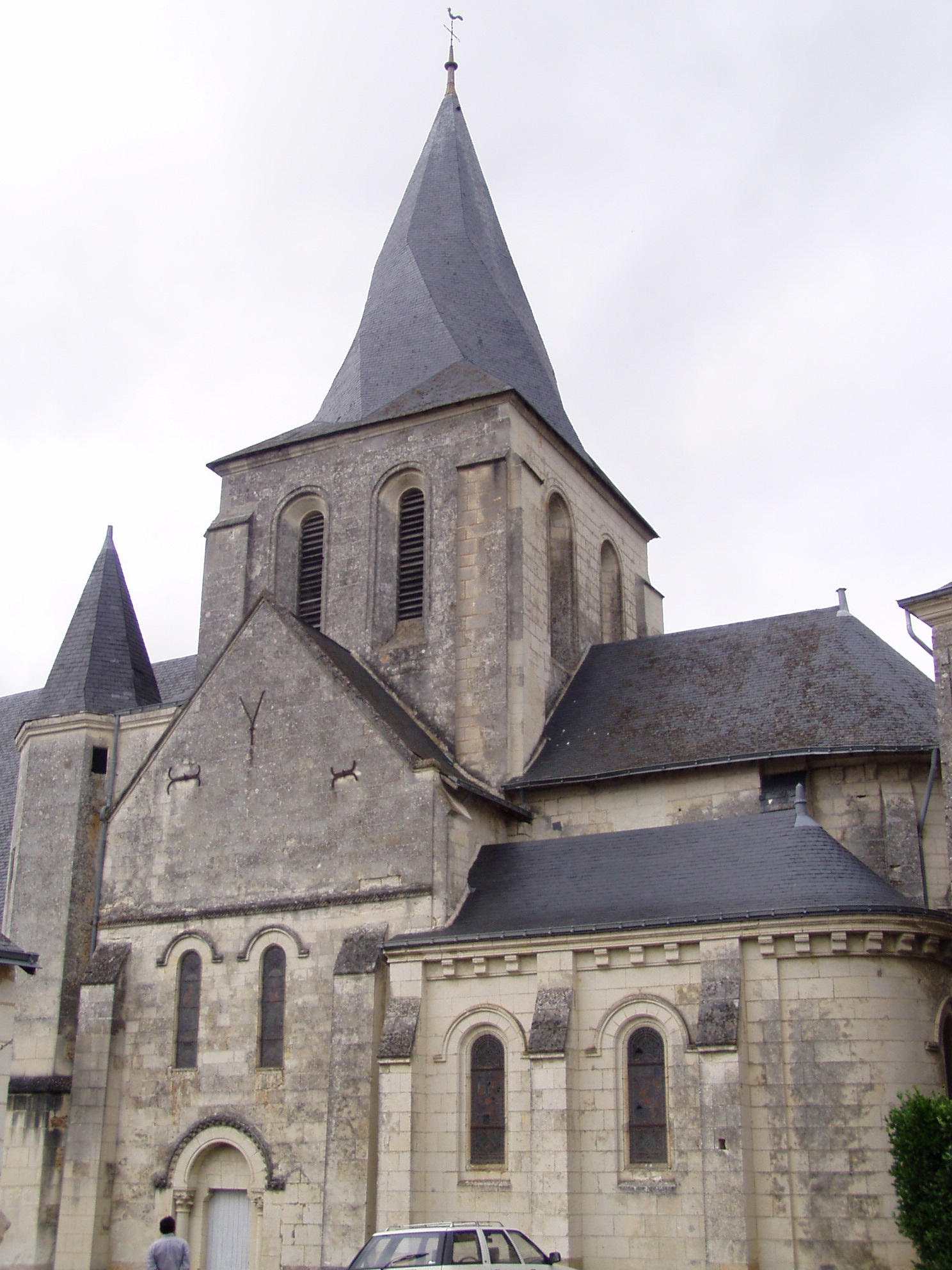 Photographie du clocher tors de l'église Saint Martin de Fontaine-Guérin dans le Maine-et-Loire prise par Accrochoc